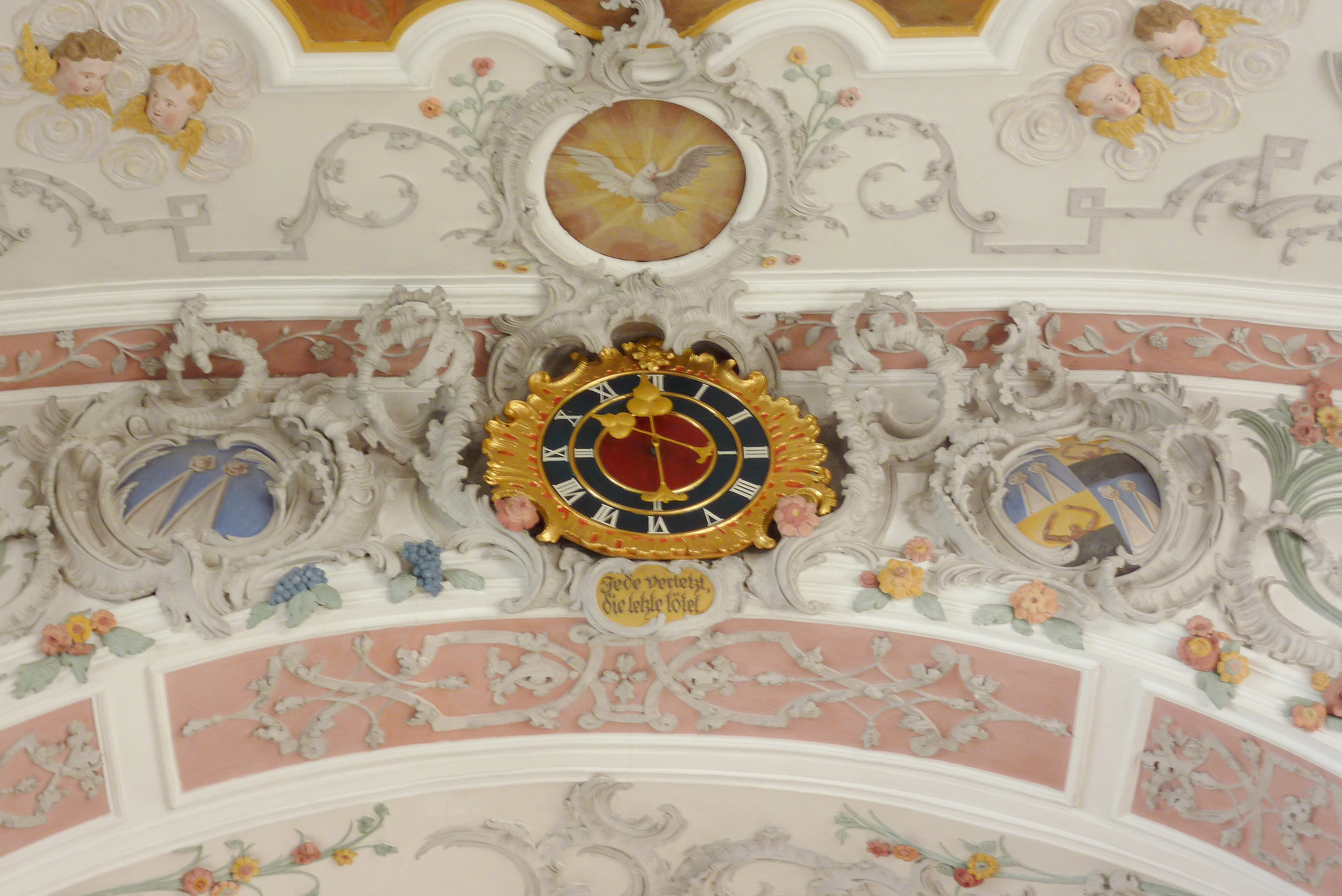 Katholische Pfarrkirche St. Martin in Horgau, einer Gemeinde im Landkreis Augsburg (Bayern), Heilig-Geist-Loch, Stuckkartuschen (Rekonstruktion von 1912) mit Wappen, Uhr darunter Inschrift: Jede verletzt, die letzte tötet.